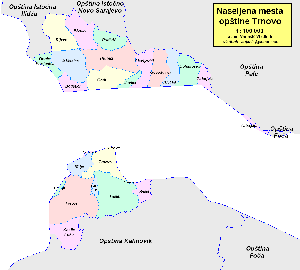 Opština Trnovo